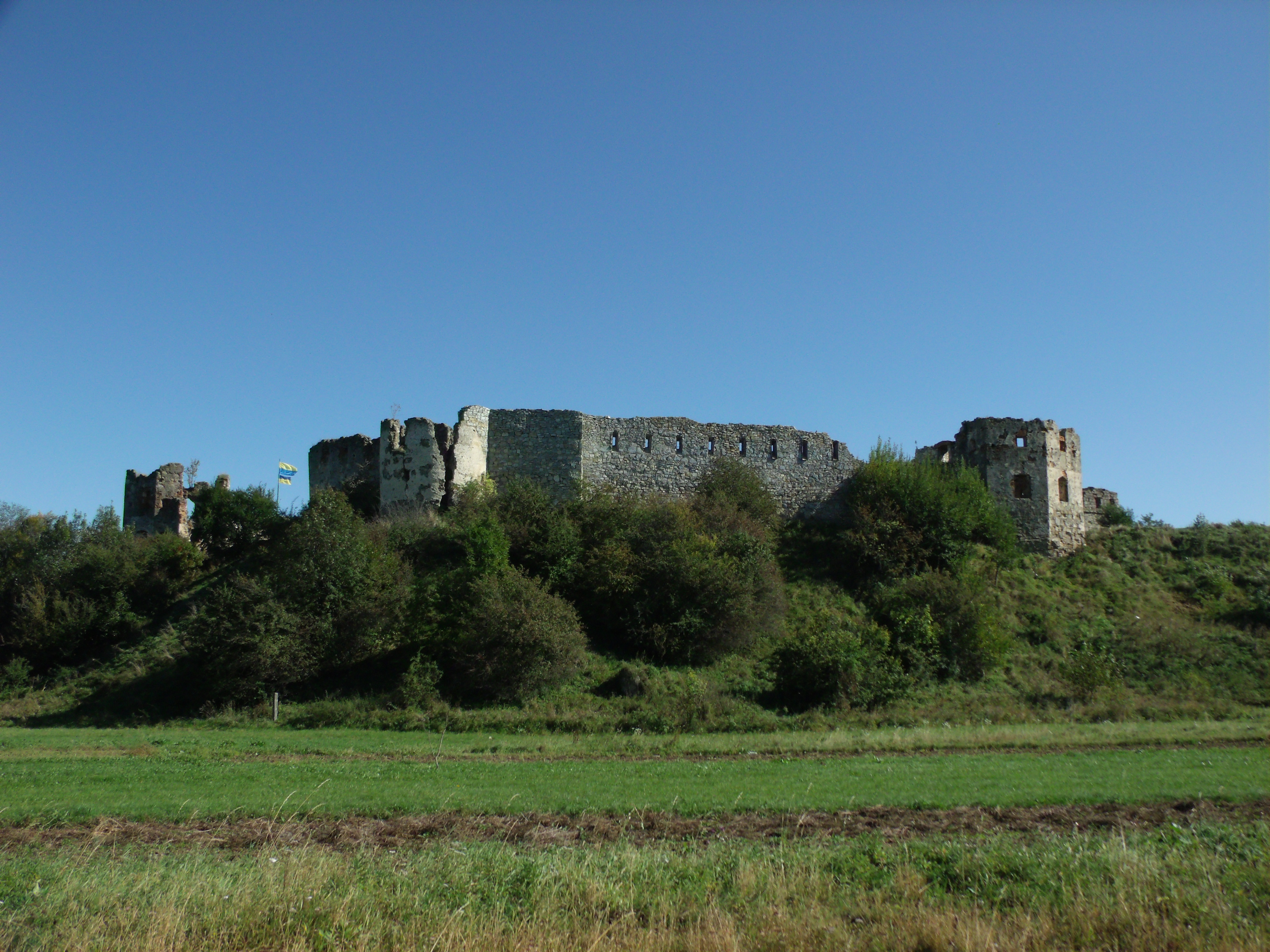 Пнівський замок — велика, добре спланована і продумана фортифікаційна споруда, яка до будівництва Станіславської твердині (1662 р.) була найбільшою на всій території Прикарпаття.